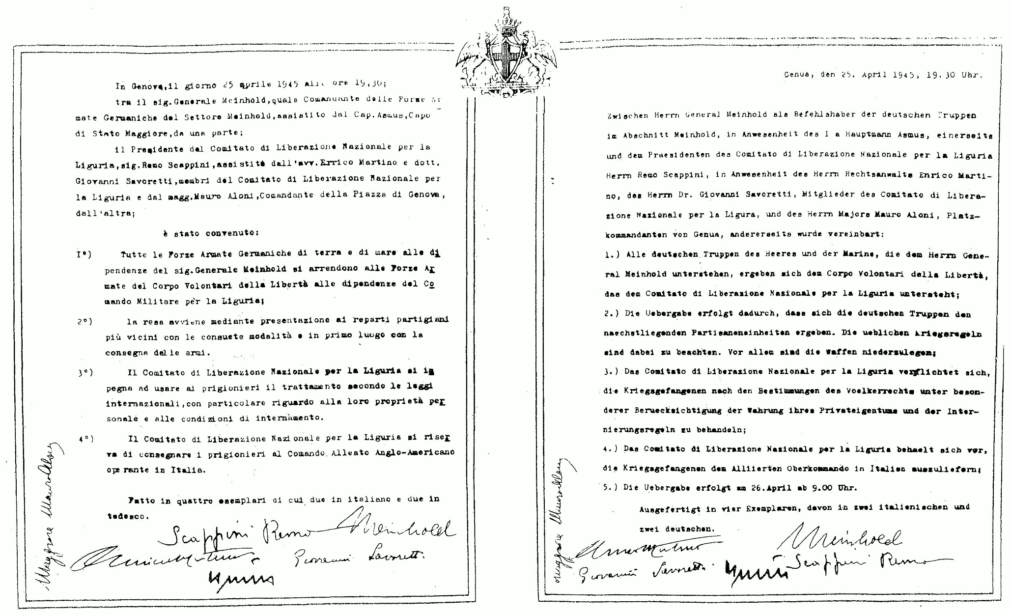 Die unterschriebene Urkunde der am 25. April 1945 in der Villa Migone vereinbarten Kapitulation.